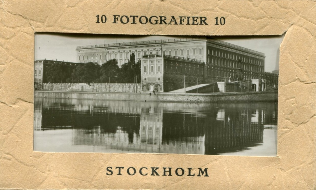 10 fotografier Stockholm utgiven och publicerad på 1930-talet av Axel Eliassons Konstförlag